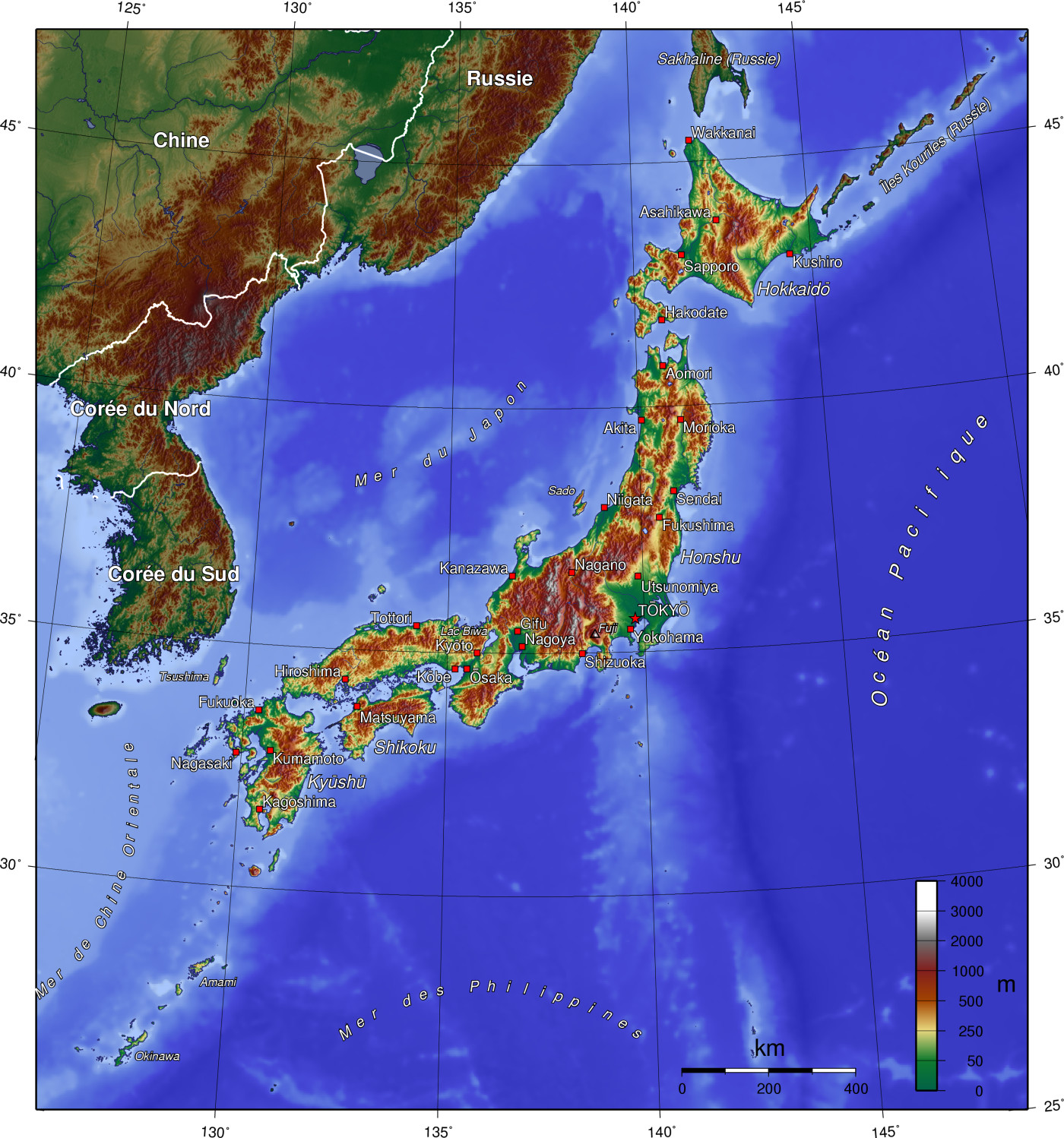 Catégorie:Carte du Japon Bild:Japan topo.jpg Image:Japan topo en.jpg